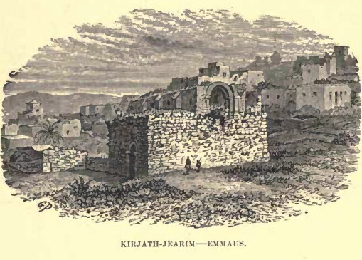 Emmaus 1886